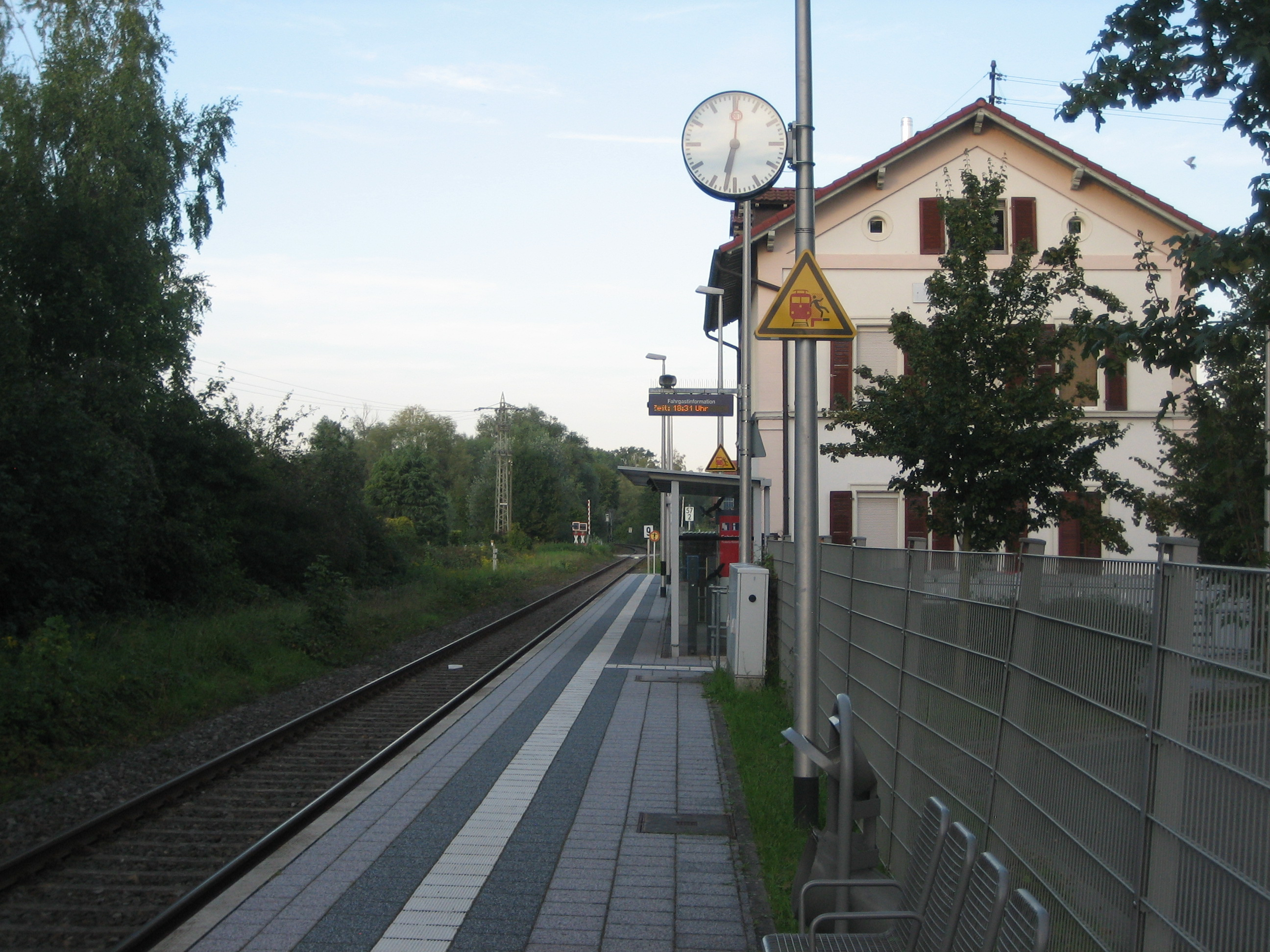 Bezeichnung: Bahnhof Neuburg (Rhein) 2014 Lage: Bahnhofstraße 28 Ort: Neubur am Rhein, Landkreis Germersheim, Rheinland-Pfalz Bauzeit: um 1860/70 Beschreibung: spätklassizistischer Typenbau